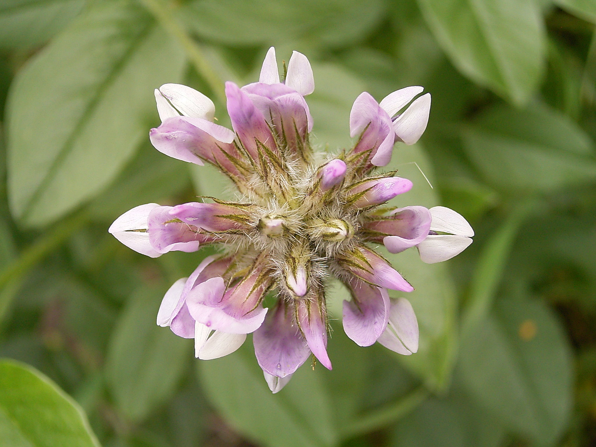 Bituminaria bituminosa growing in Barlovento, La Palma, Canary Islands